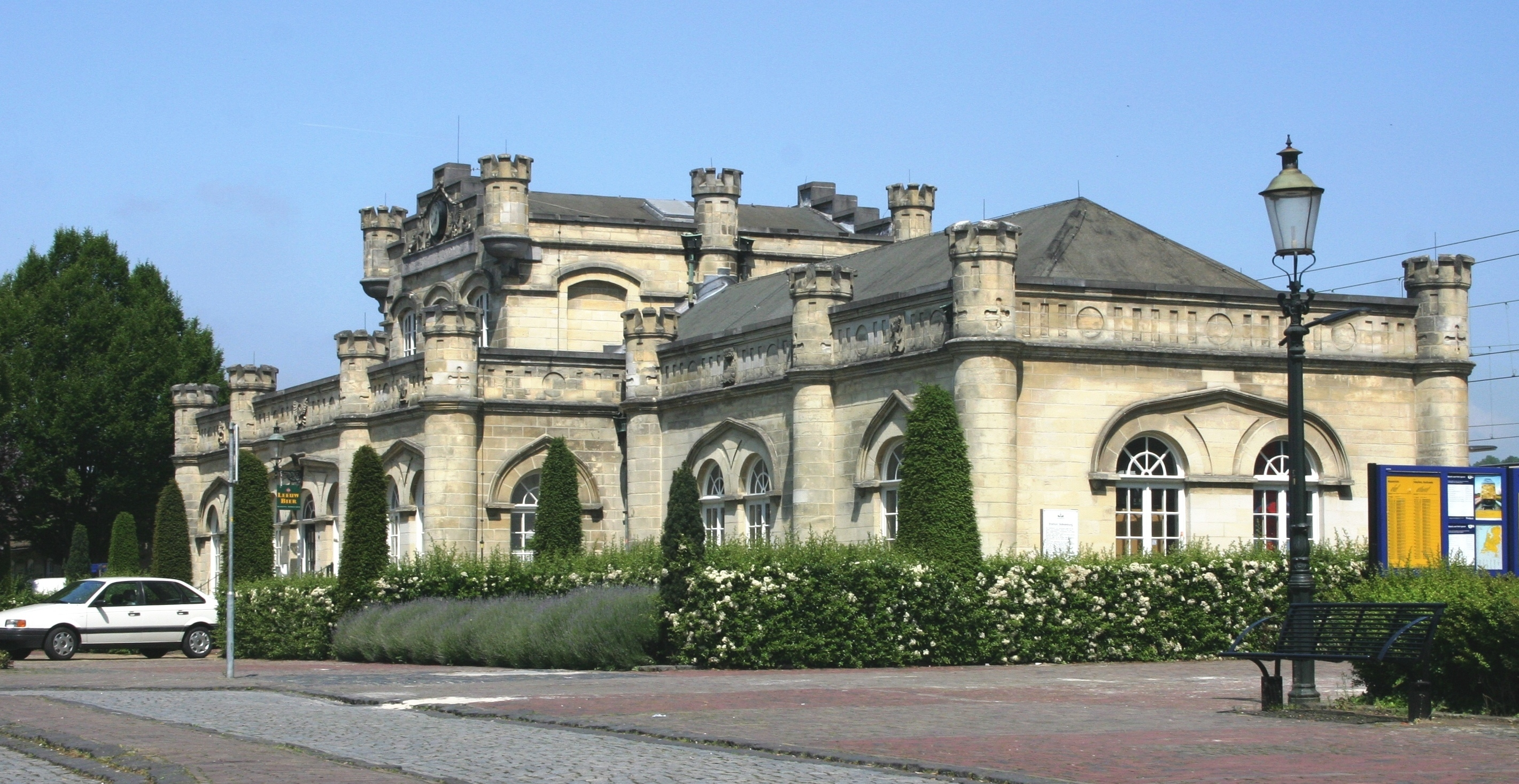 Gare vu Valkenburg.